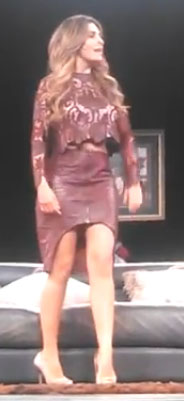 Mayrin Villanueva en una obra de teatro